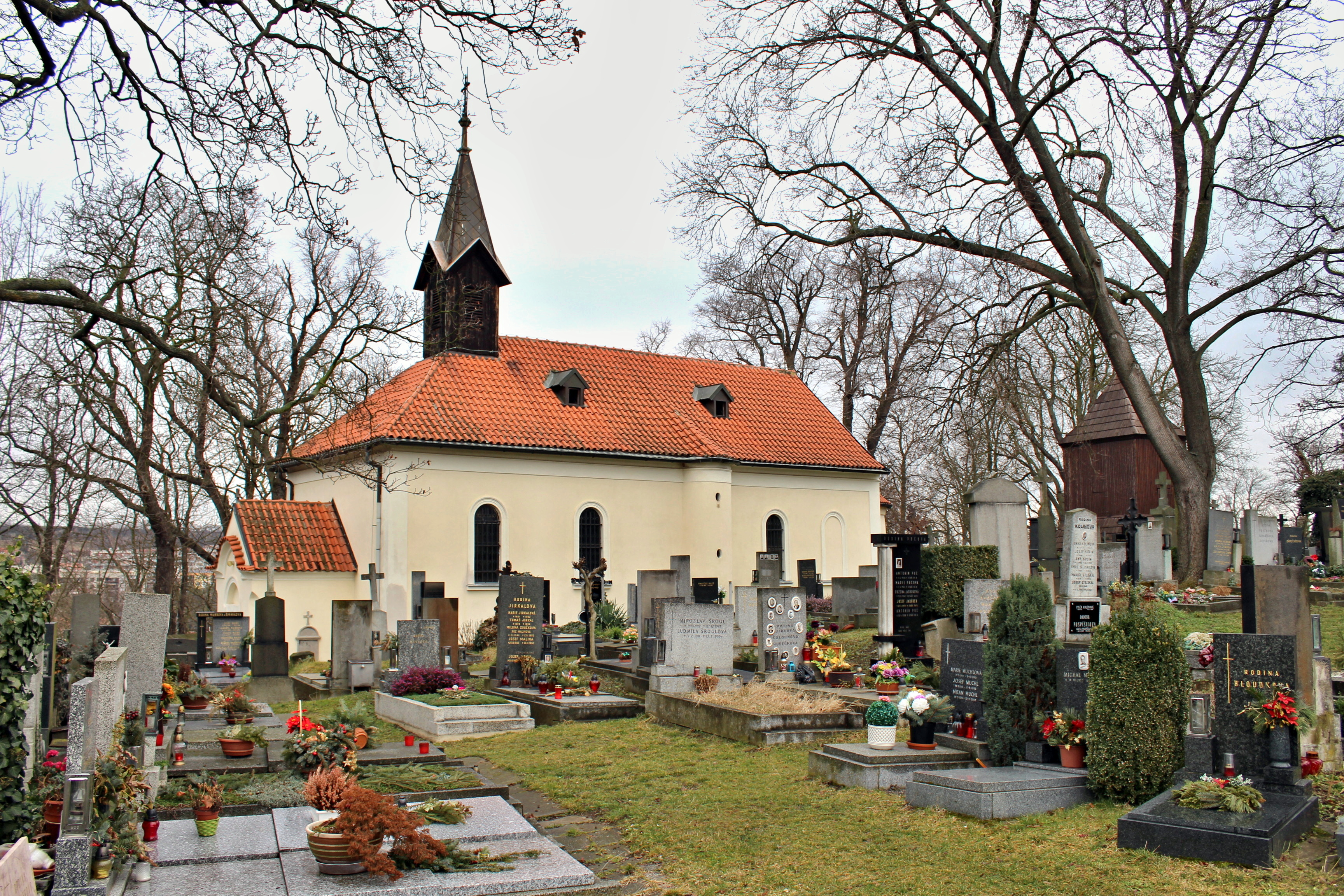 Kostel svatého Vavřince, Butovice - Jinonice